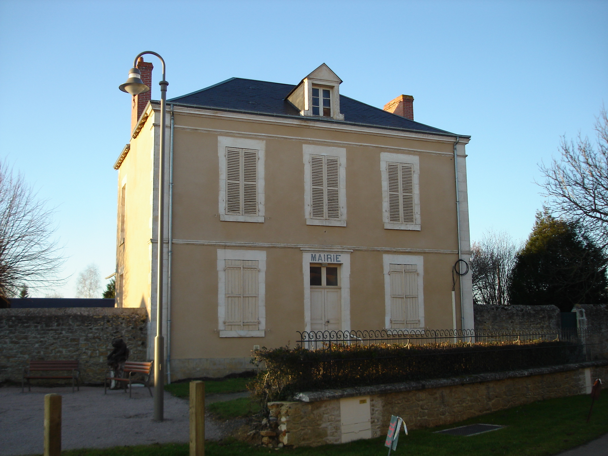 Lourouer-Saint-Laurent (36) : L'ancienne mairie.